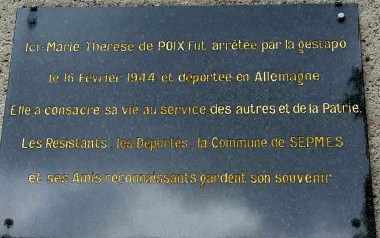 Plaque commémorative Marie-Thérèse de Poix